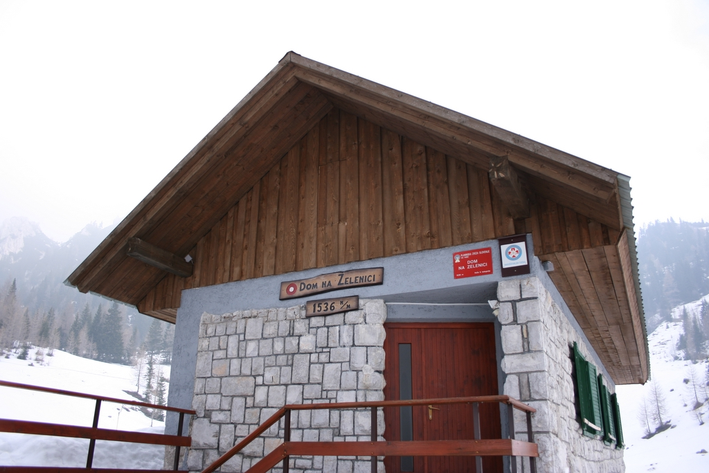 Planinski dom na Zelenici